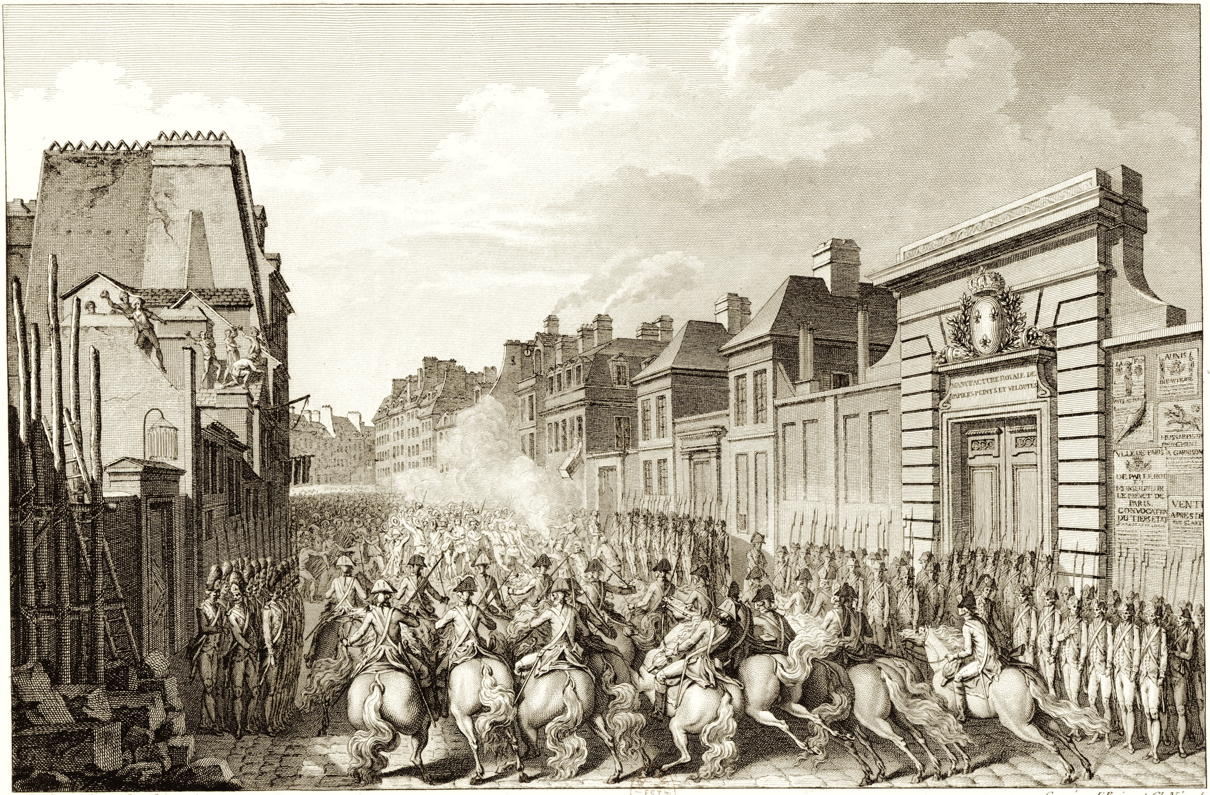 Sujet : Pillage -- France -- Paris (France) Sujet : Manufacture Réveillon (Paris) Sujet : France. Armée. Gardes françaises Sujet : Paris (France) -- Rue du Faubourg-Saint-Antoine Sujet : Paris (France) -- Histoire (1789, émeutes) Sujet : Scènes historiques -- 1789-1799